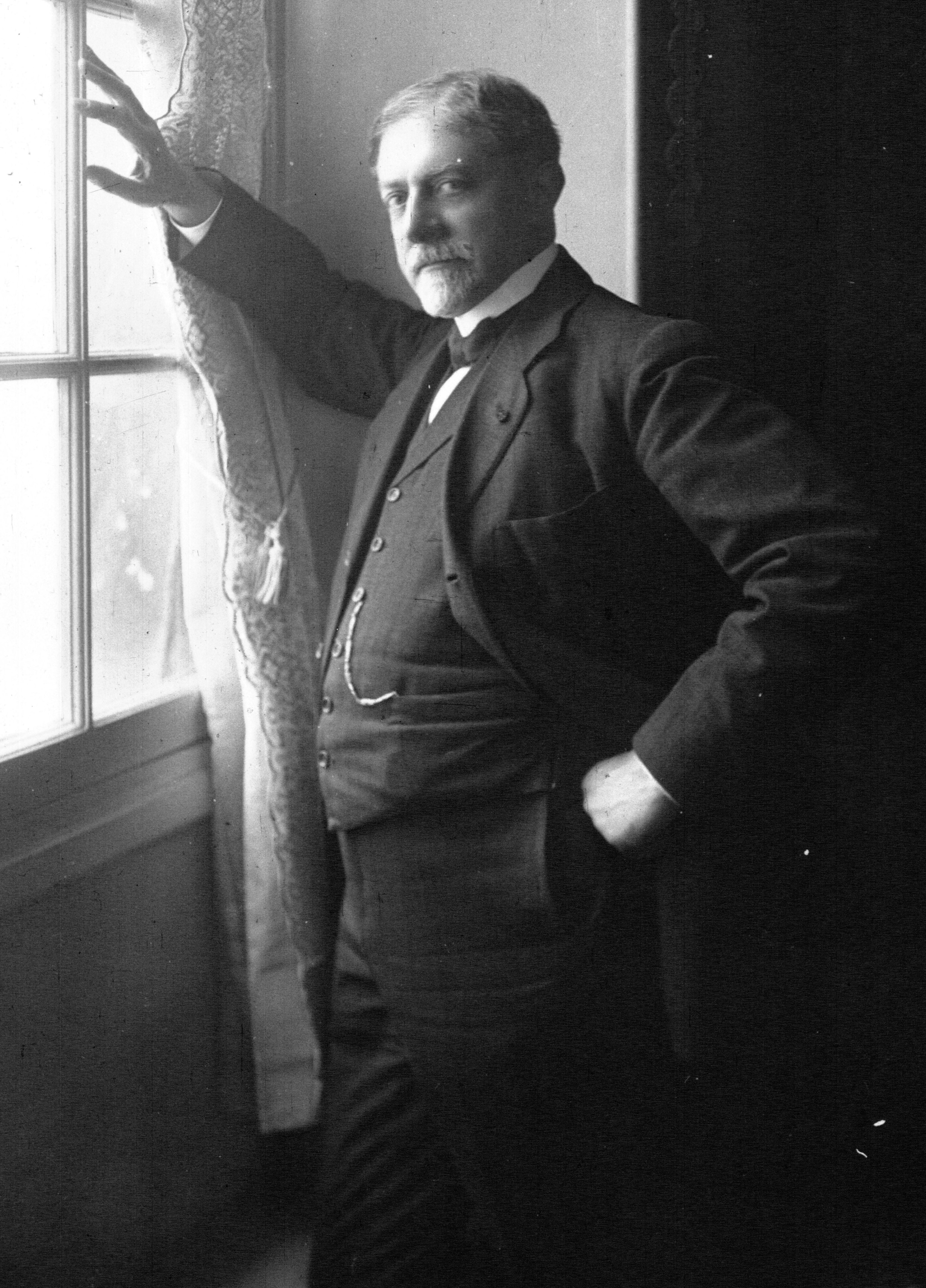 M. Baudin, ministre de la Marine, gros plan : photographie de presse